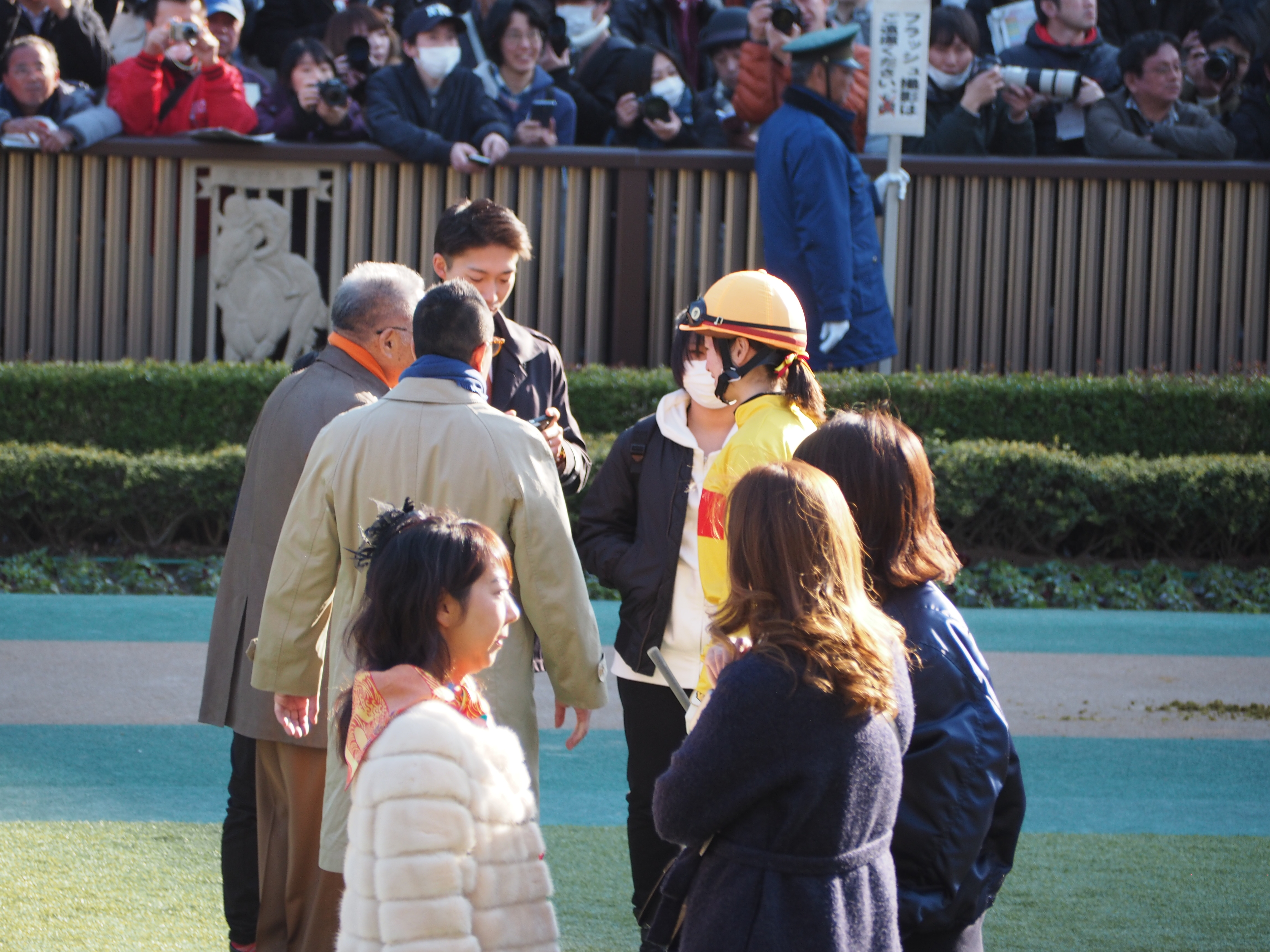 フェブラリーステークスのパドックで話をするDr.コパと藤田菜七子